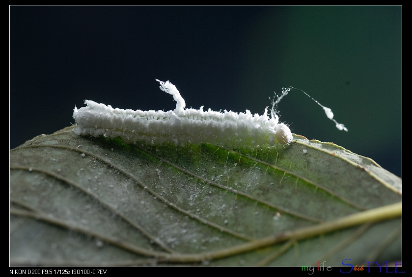 Epicopeia hainesii matsumurai